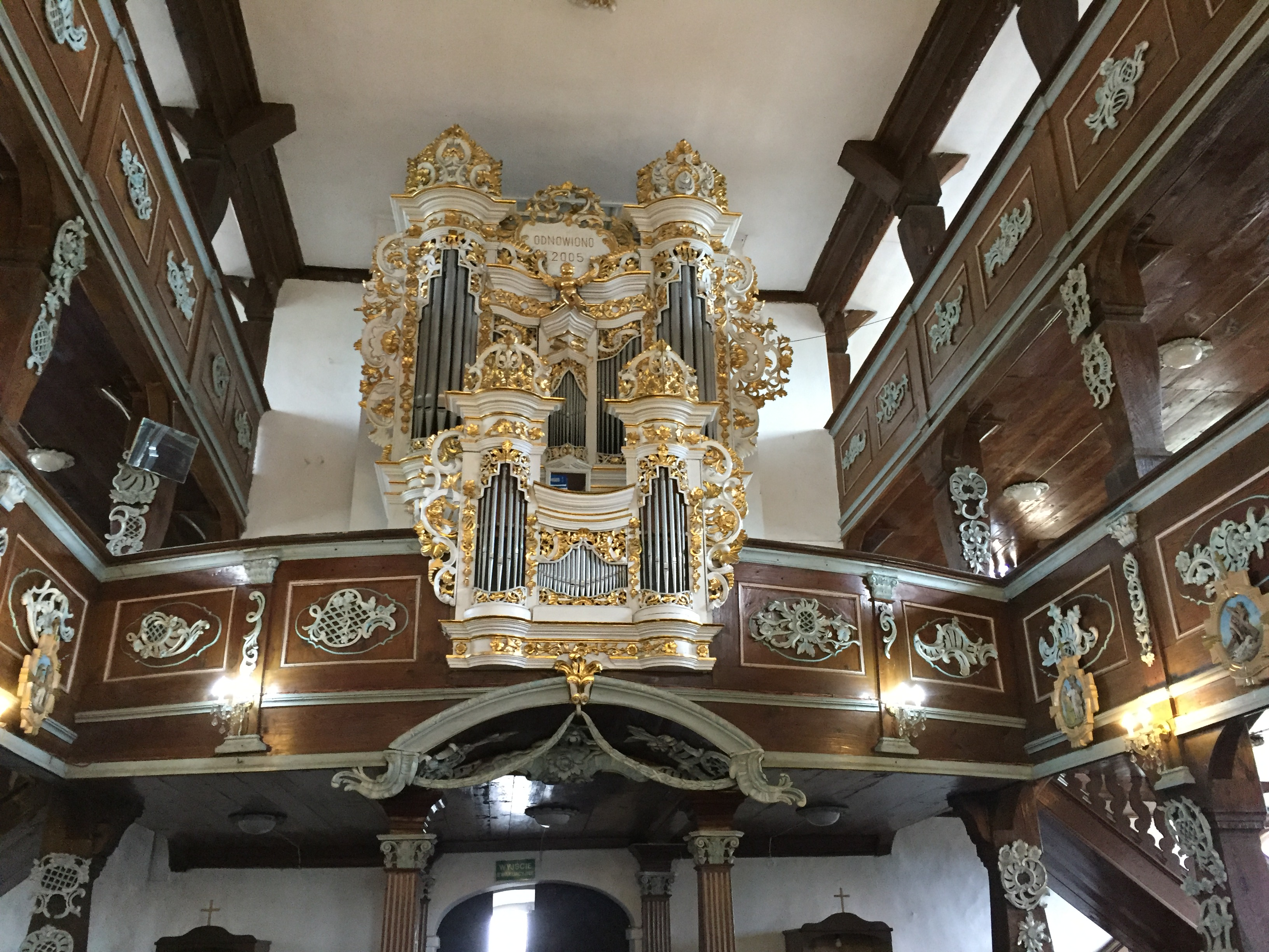 organy w kościele w Wierzchowicach